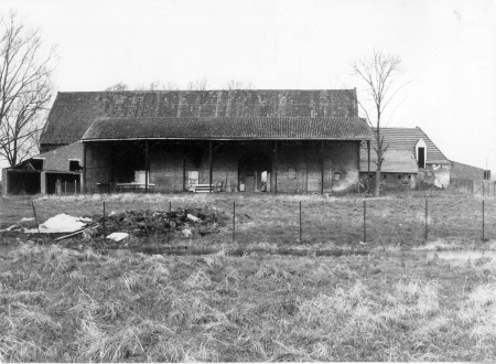 La ferme du Héron au moment des premiers travaux de restauration , archives de la ville de Villeneuve d'Ascq